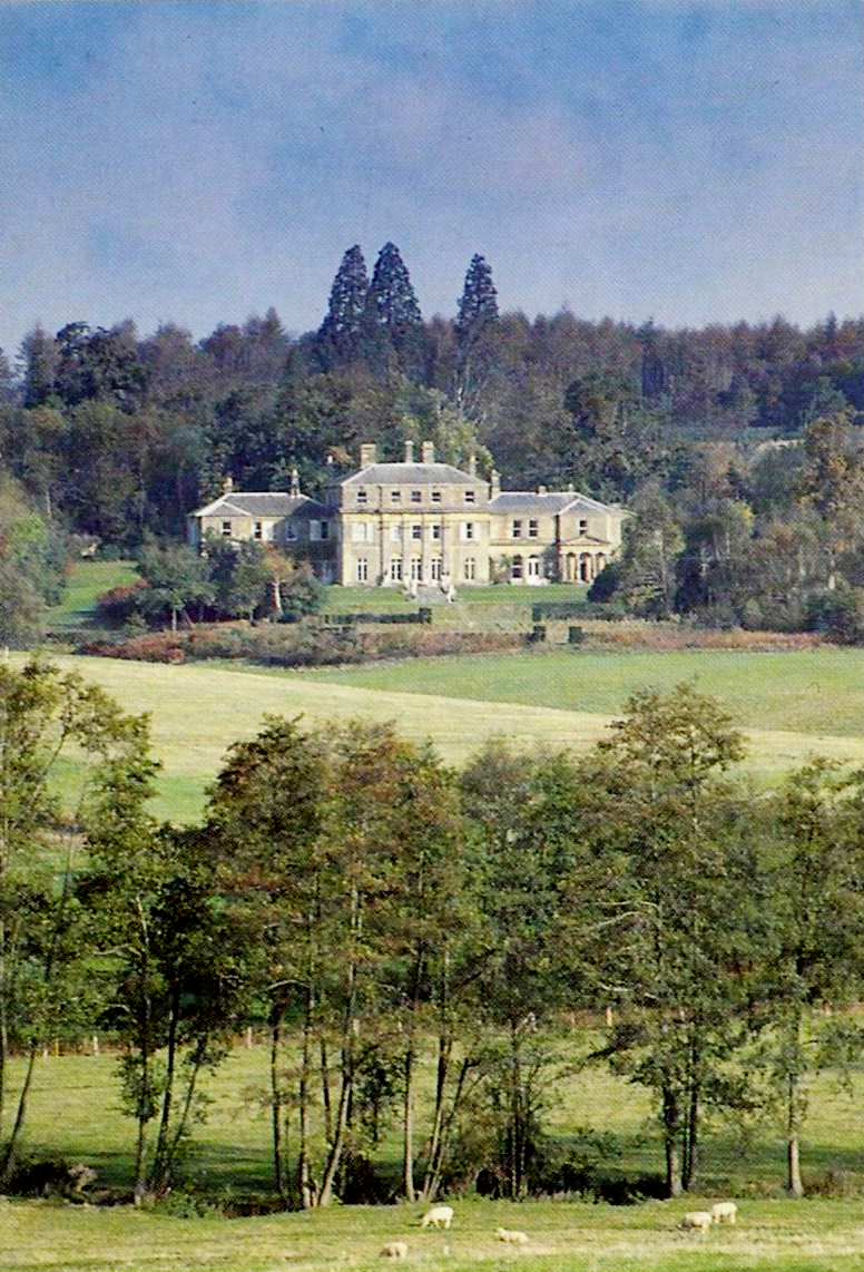 Hammerwood Park, summer 1988.